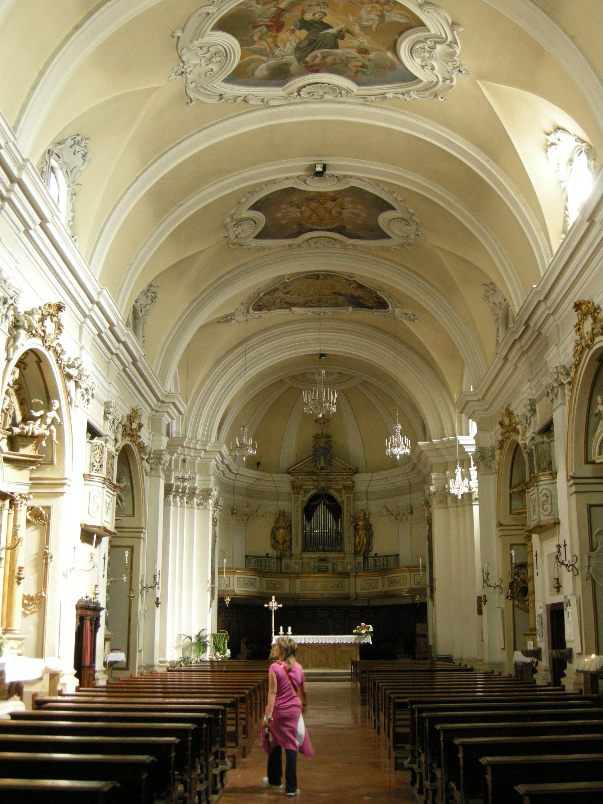 Città di castello, san francesco, interno